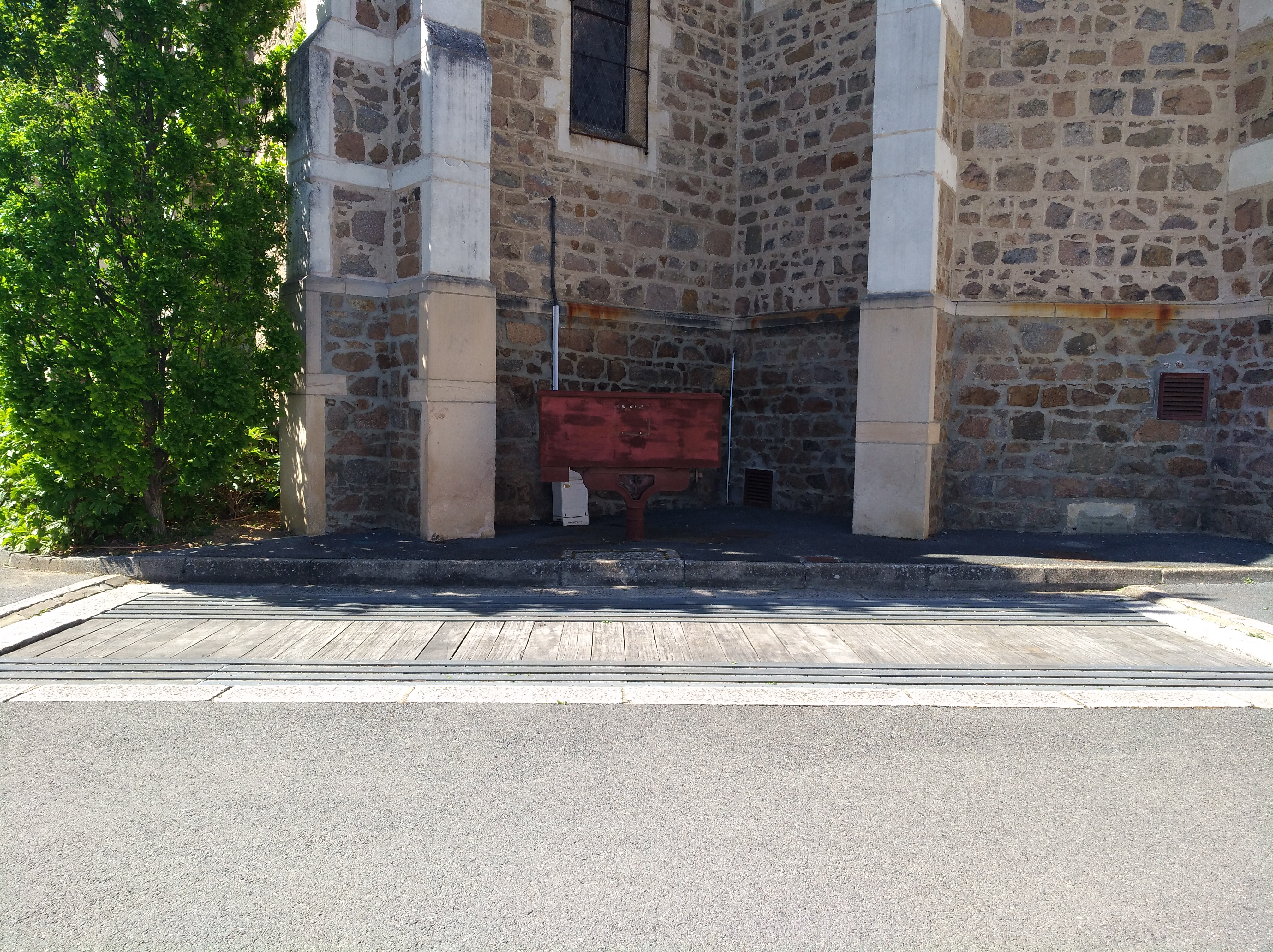 Ancienne bascule du Perréon (Rhône, France).